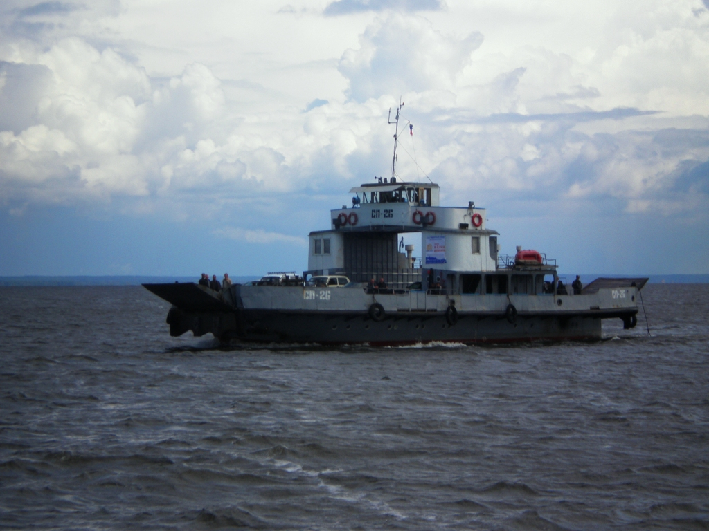 Паром через Волгу СП-26